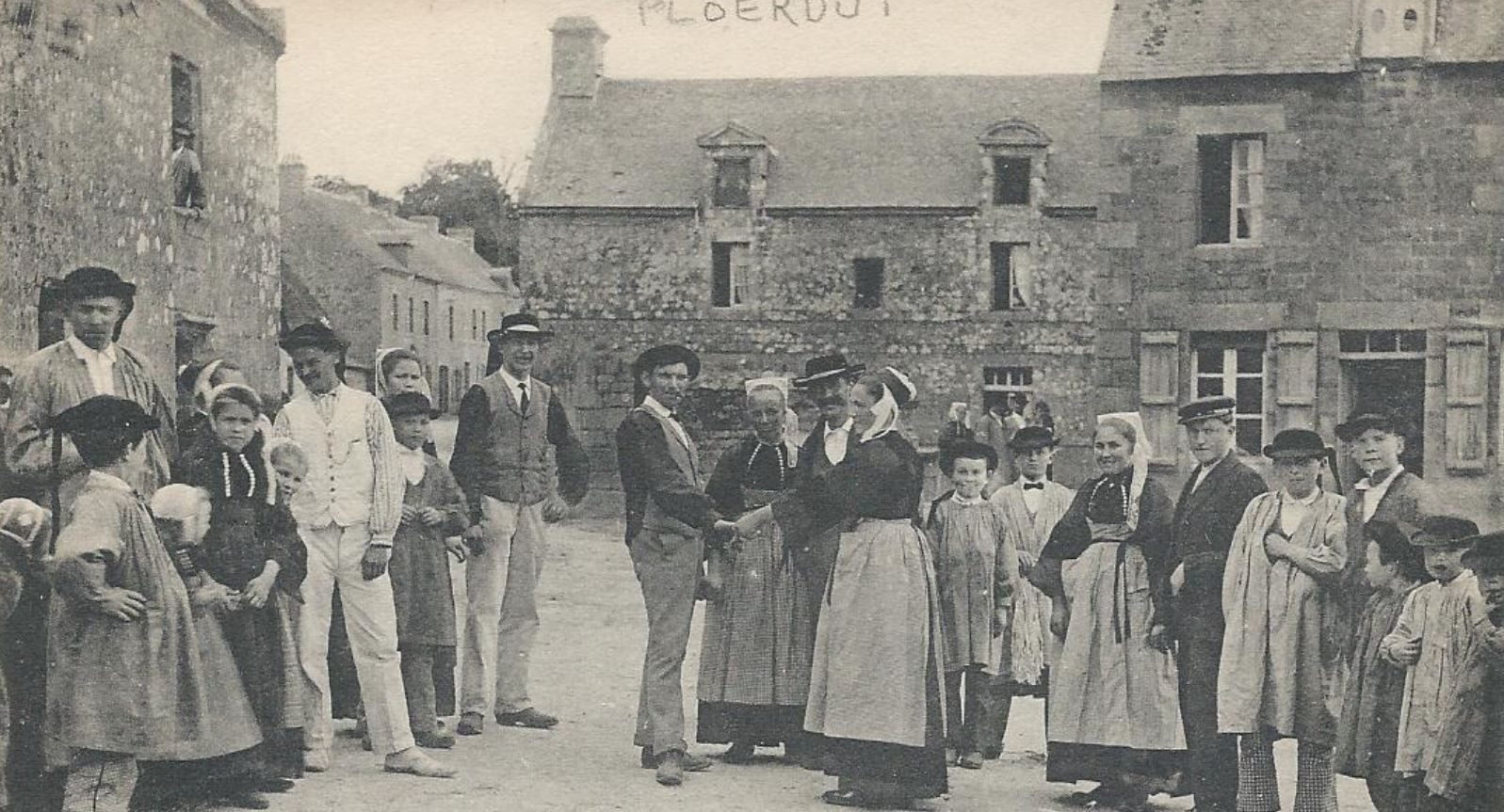 Carte postale édité par Le Cunf datant du premier quart du vingtième siècle. Photo prise dans le bourg de Ploërdut dans le département du Morbihan.